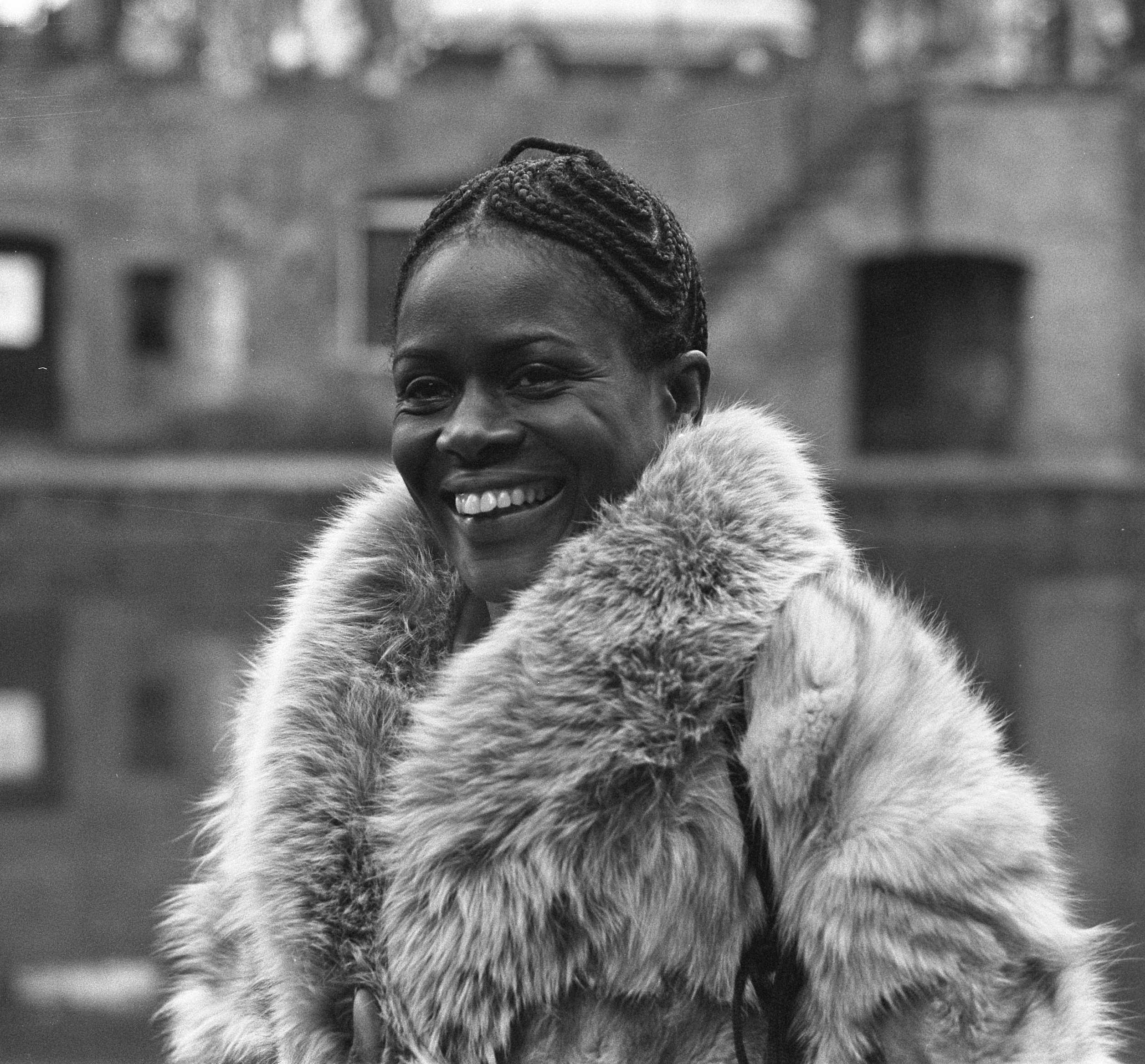 Amerikaanse filmster Cicely Tyson tijdens persconferentie in Utrecht